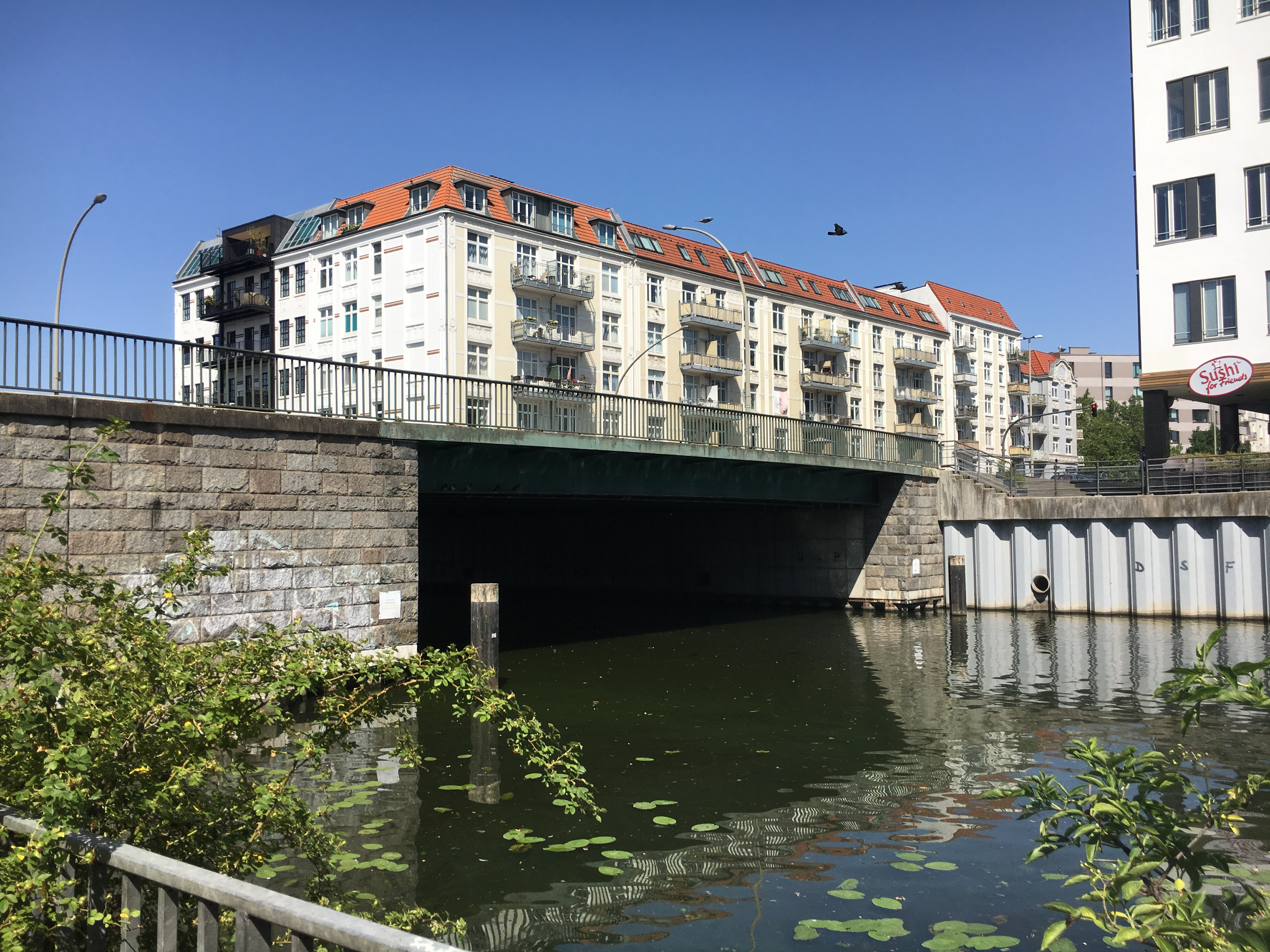 Bachstraßenbrücke